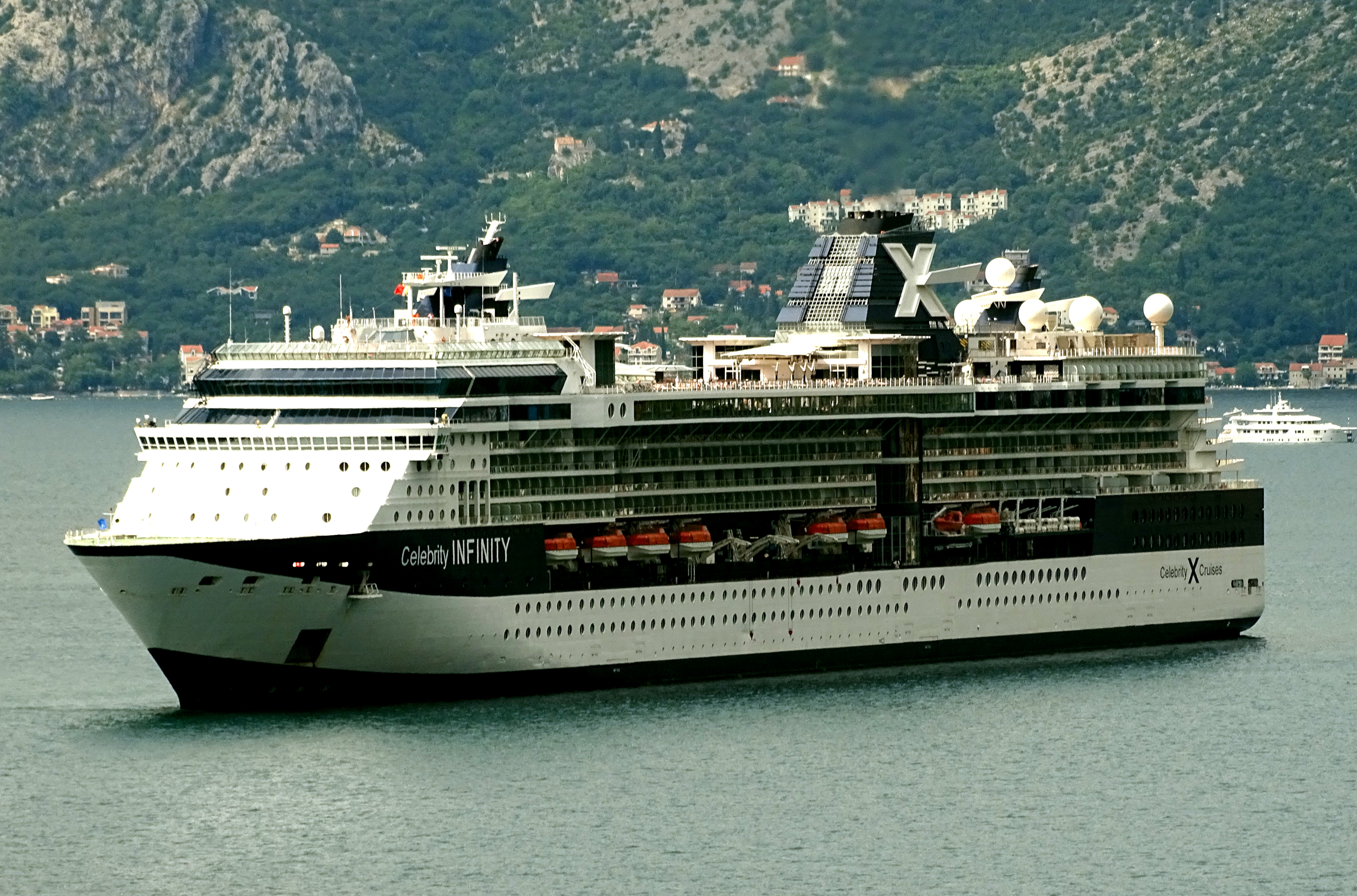 De Celebrity Infinity in Kotor.